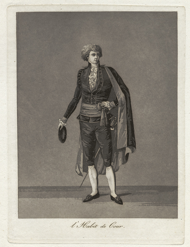 Gustaf III:s nationella dräkt/svenska dräkten. "L'Habit de Cour." Herre i hovdräkt. Akvatint av Johan Abraham Aleander, trol. 1780-tal.